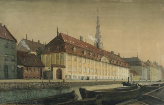 Søkvæsthuset at Christianshavns Kanal in Copenhagen, Denmark